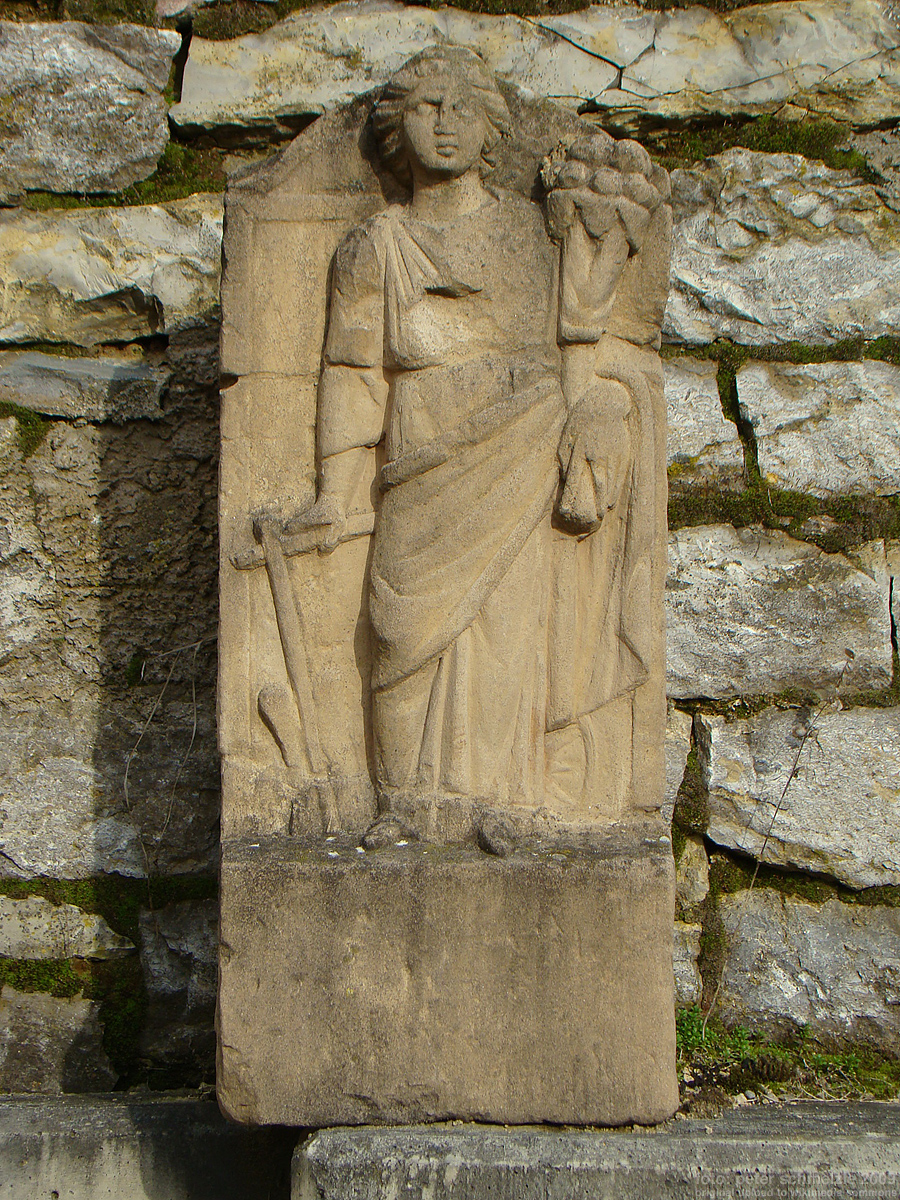 Kopie von römischen Funden im Römerbad Jagsthausen